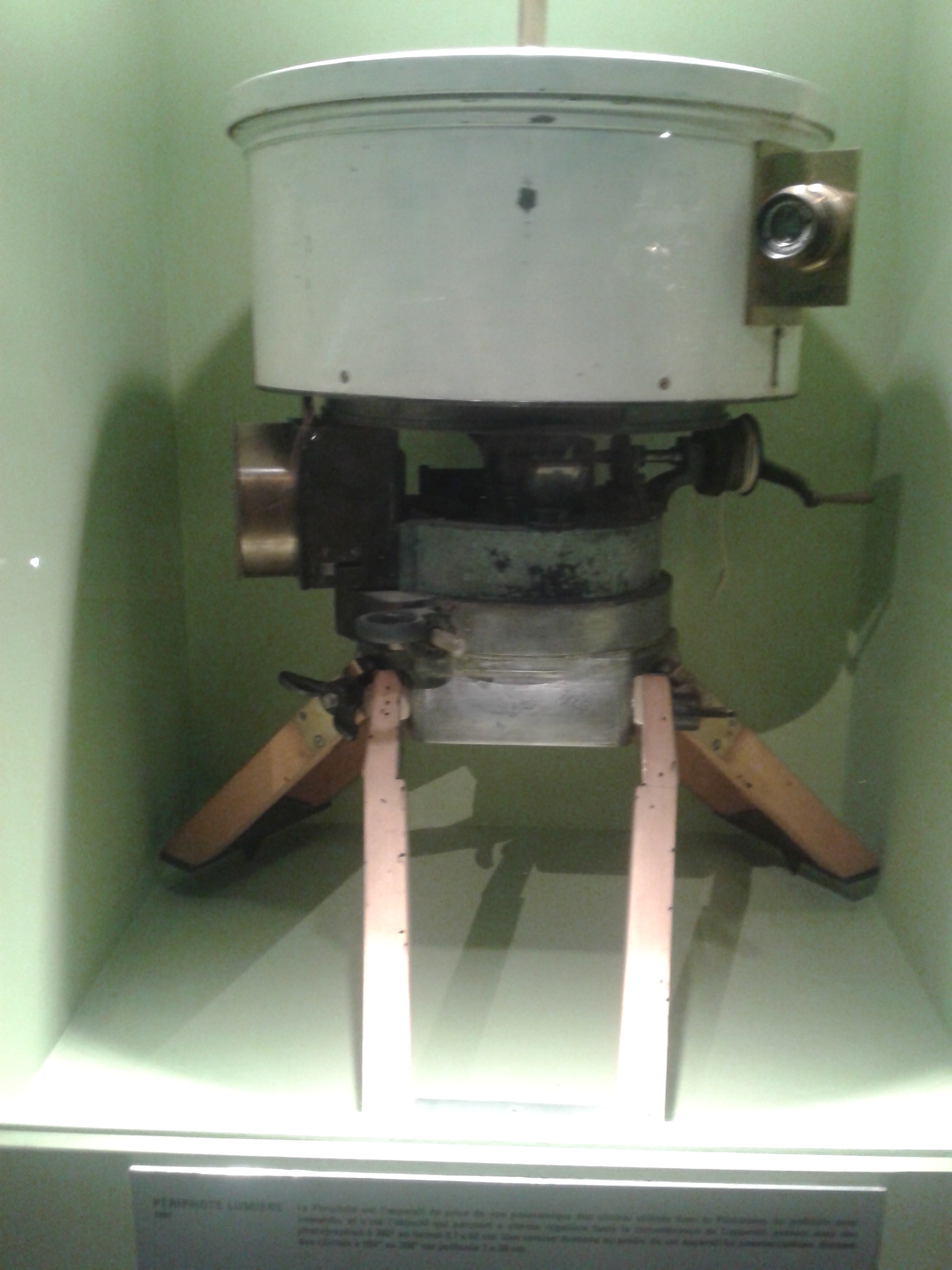 Un périphote des frères Lumières, appareil photographique exposé à l'Institut Lumière de Lyon qui permet de prendre des vues à 360º.